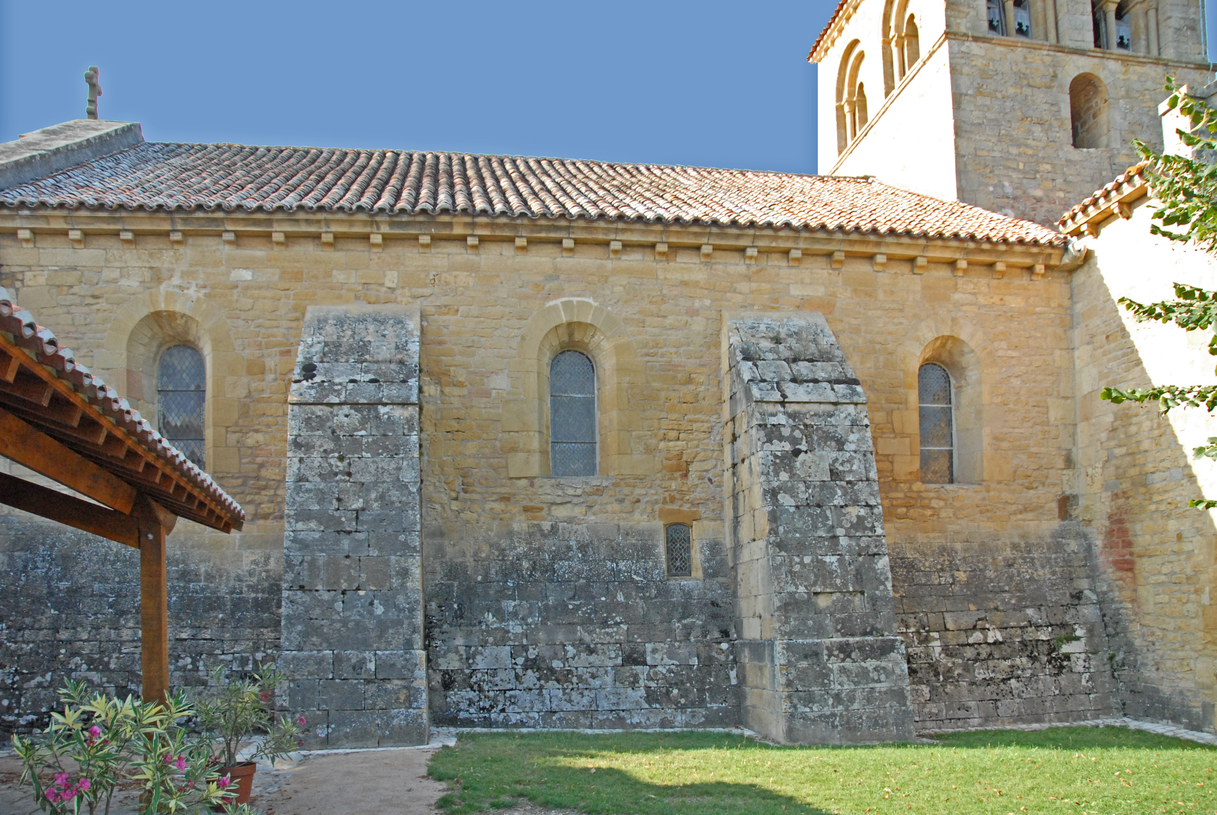 St-André d'Iguerande, Langhaus von Südosten